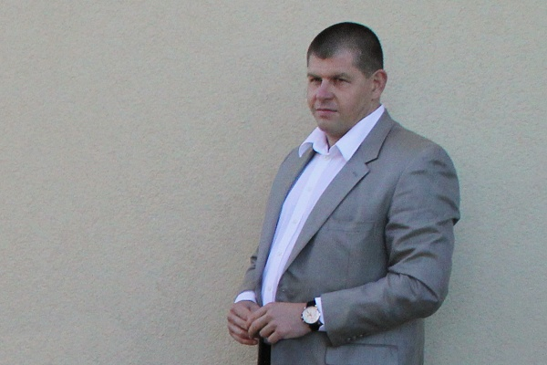 Radim Zika (2010)